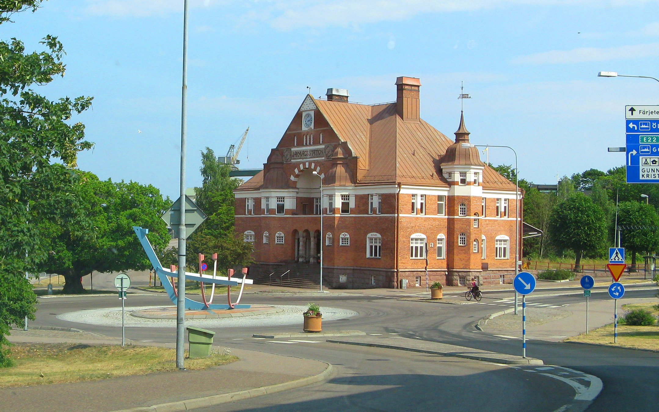 Oskarshamns järnvägsstation byggd 1906.